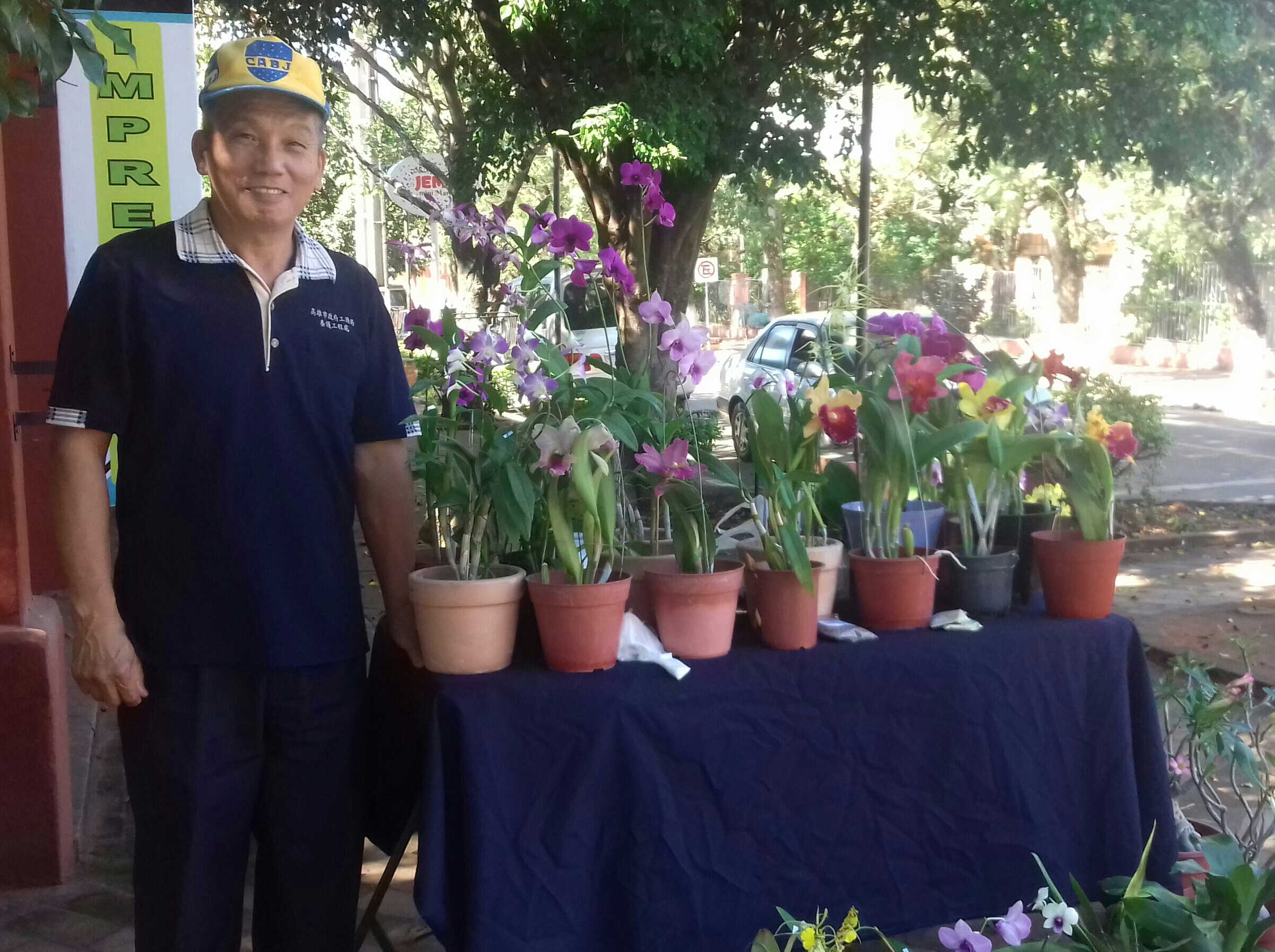 El mayor volumen de los inmigrantes chinos en Paraguay está constituido por ciudadanos de procedencia taiwanesa. Esto se debe a que Paraguay es el único país sudamericano que reconoce a la República de China (Taiwán) en lugar de la República Popular China (China continental).